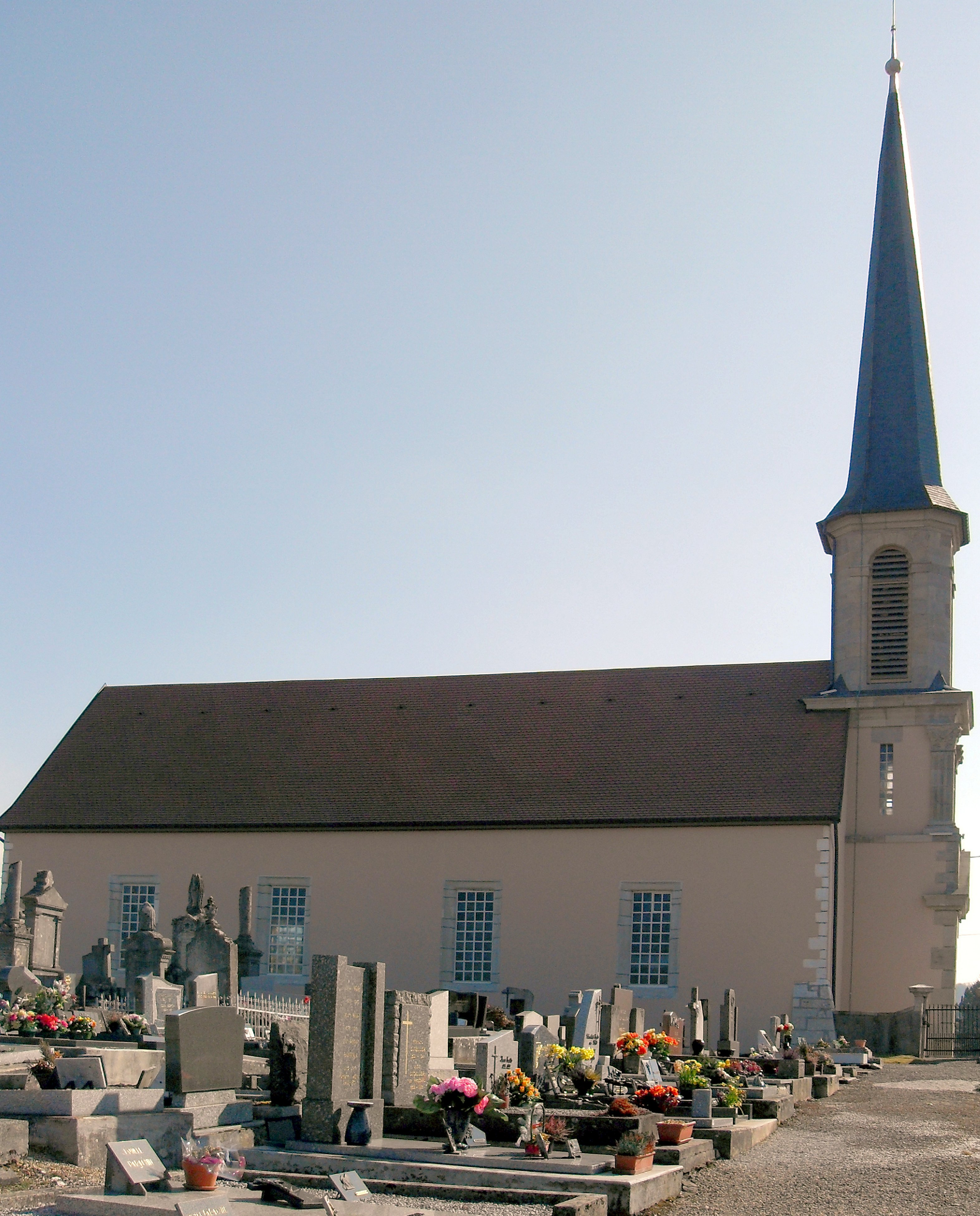 Le temple protestant luthérien à Dampierre-les-Bois